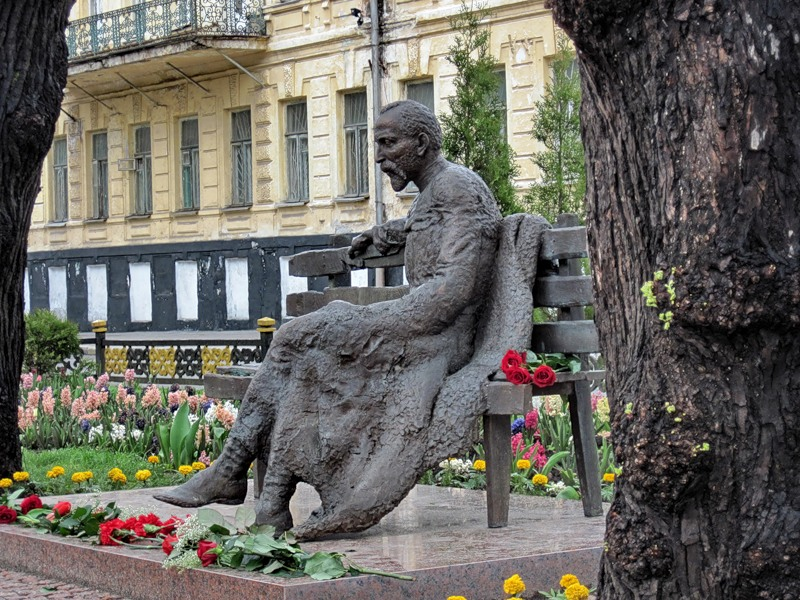 Скульптурная композиция «Коста Хетагуров» установлена в апреле 2010 года на проспекте Мира у входа в Центральный парк Владикавказа. Автор монумента скульптор Владимир Соскиев преподнёс его городу в дар.